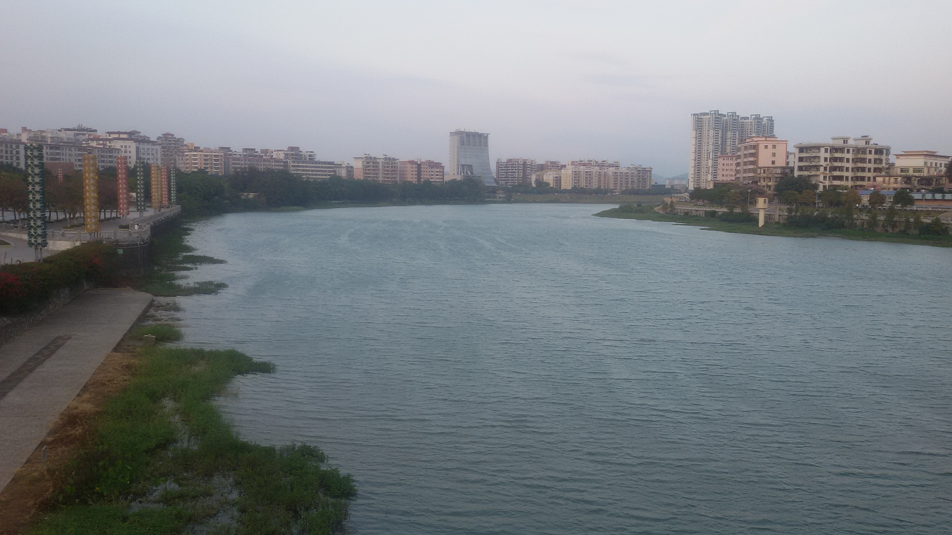 粵語: 流溪河（从化市区段）